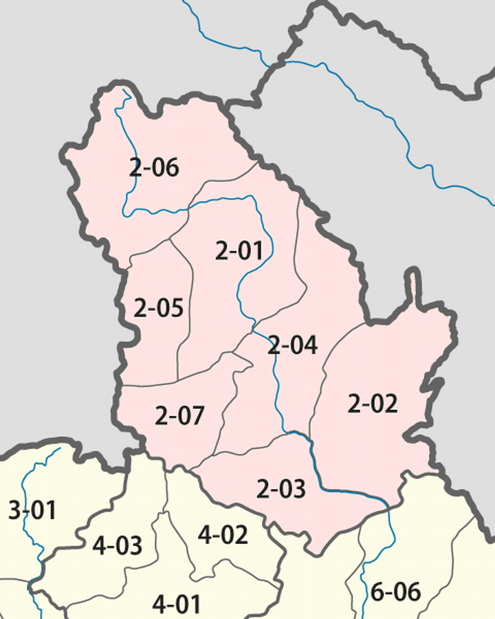 Giấy phép